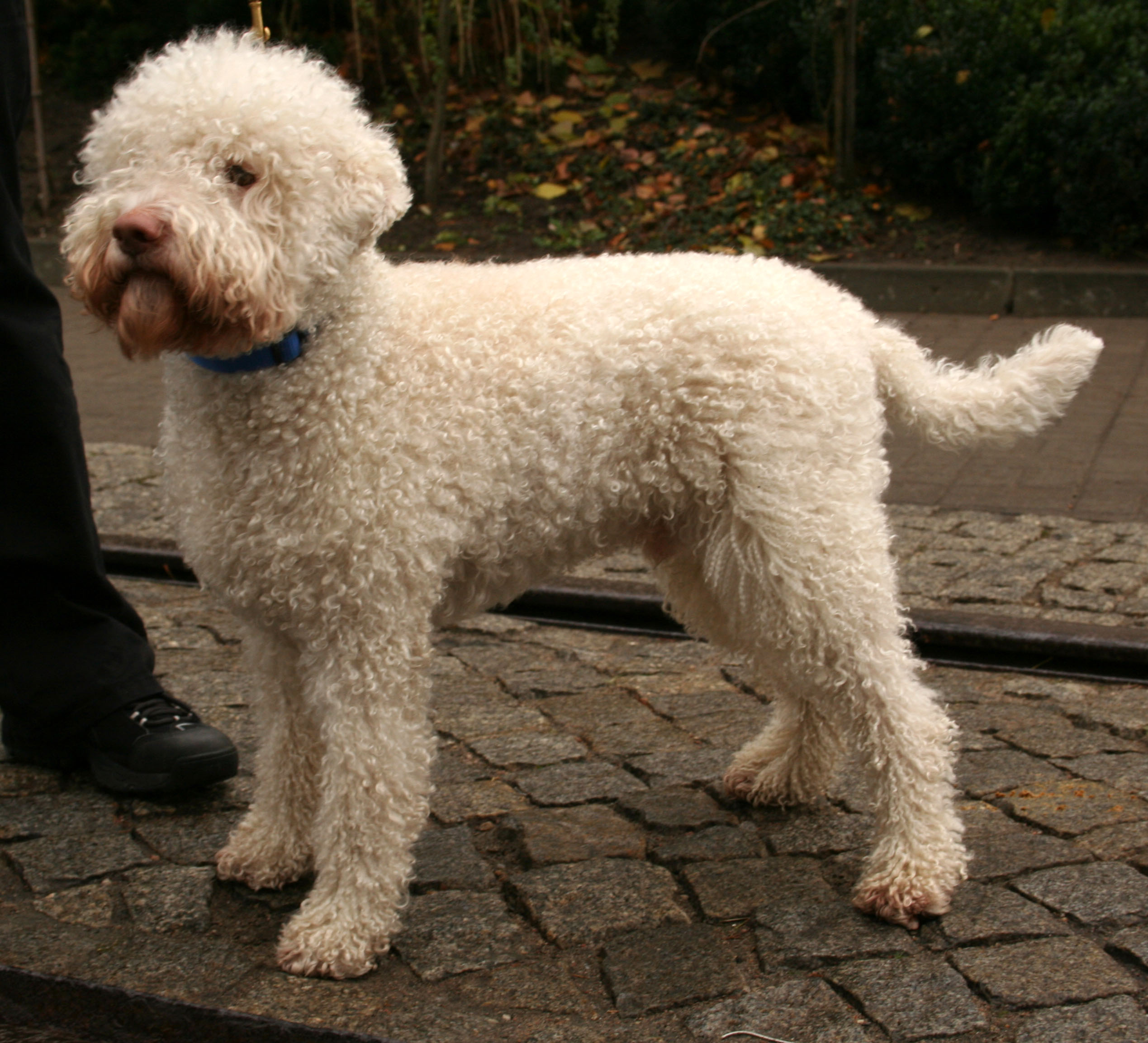 Lagotto_romagnolo na Światowej Wystawie Psów Rasowych w Poznaniu